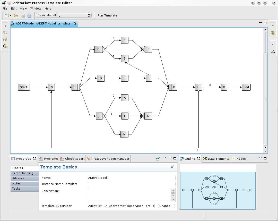 Beispiel eines ADEPT-Prozessmodells. Enthält eine Schleife (Knoten LS-LE), eine parallele Verzweigung (Knoten B-O), zwei bedingte Verzweigungen (Knoten C-F&J-N), eine Synchronisationskante (Knoten I-E) und mehrere Sequenzen (bspw. Knoten G-I)